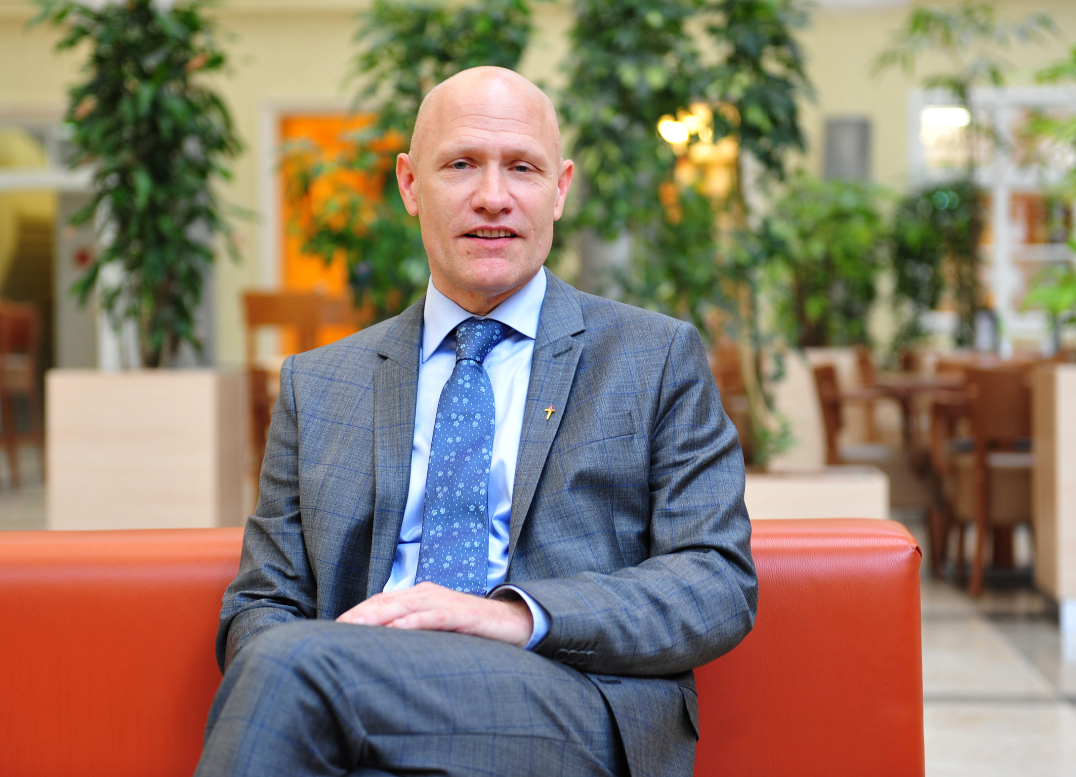 180609_GeistFamilieSAAT_epdUschmann_49